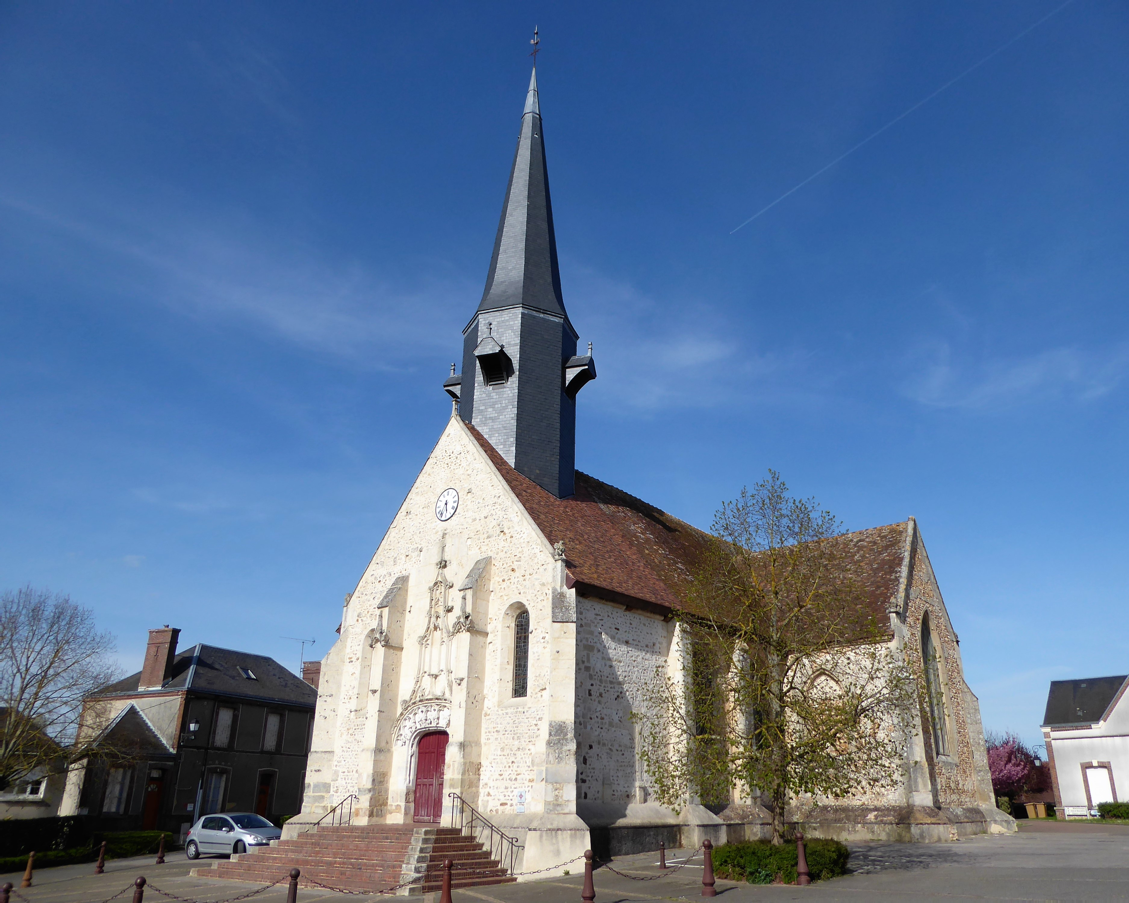 église Saint-Rémy de Saint-Rémy-sur-Avre, Eure-et-Loir, France.